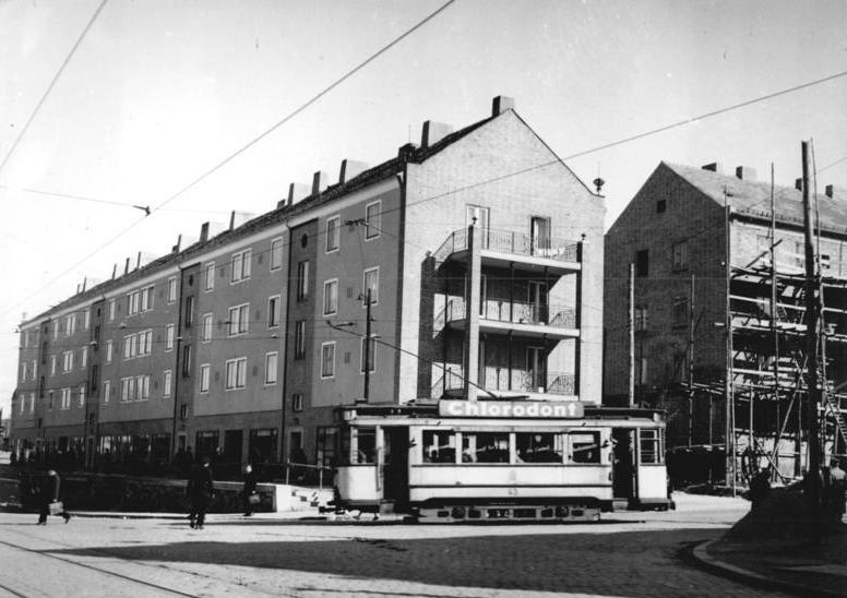 Frankfurt/Oder, Wilhelm-Pieck-Straße, Straßenbahn Zentralbild Klein 17.4.1953 Vom Wiederaufbauprogramm in Frankfurt/Oder. Im Stadtzentrum der noch in den letzten Kriegstagen schwer zerstörten Oderstadt Frankfurt entsteht gegenwärtig ein großer, moderner Wohnkomplex für Werkstätige. UBz: Die neuen, schon bezogenen und mit HO- und Konsumgeschäften versehenen Wohnblöcke in der Wilhelm-Pieck-Straße.